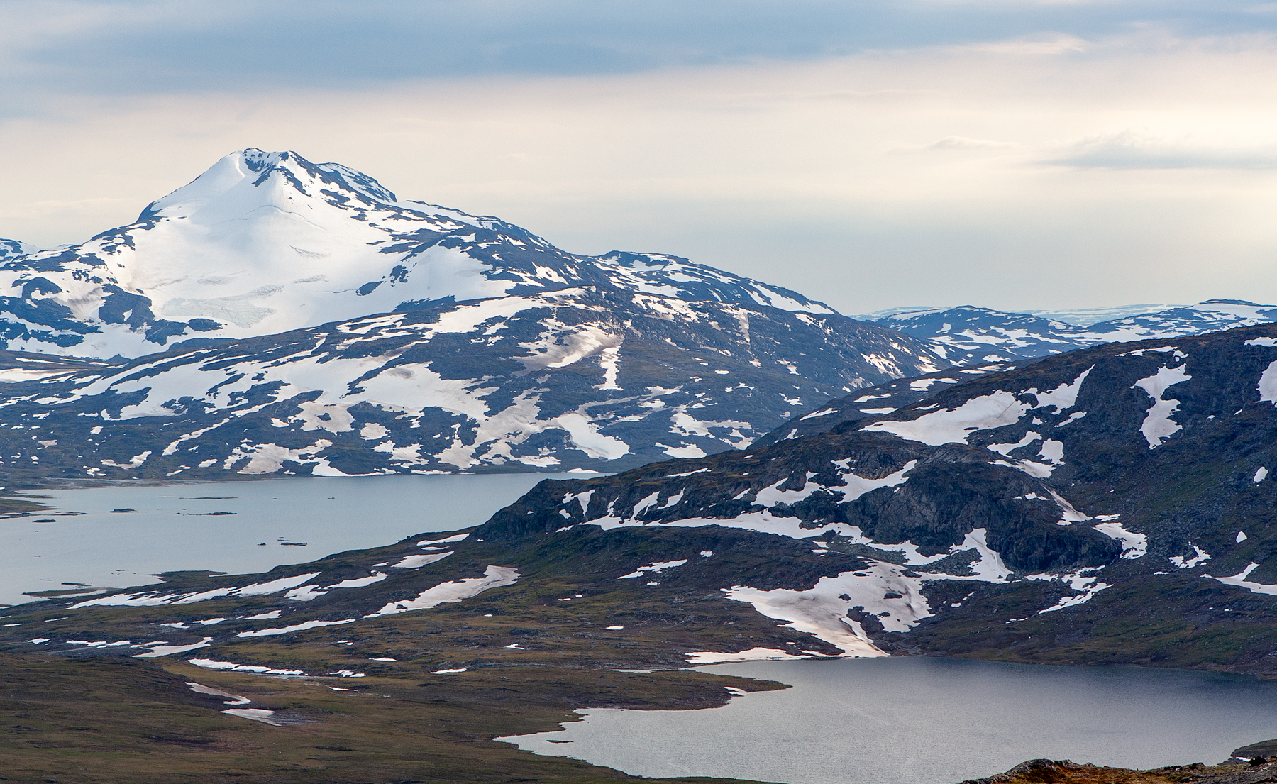 Vy från berget Viehtjer mot Sorjostjåhkkå. Till höger den namnlösa sjön med id 746250-152806.